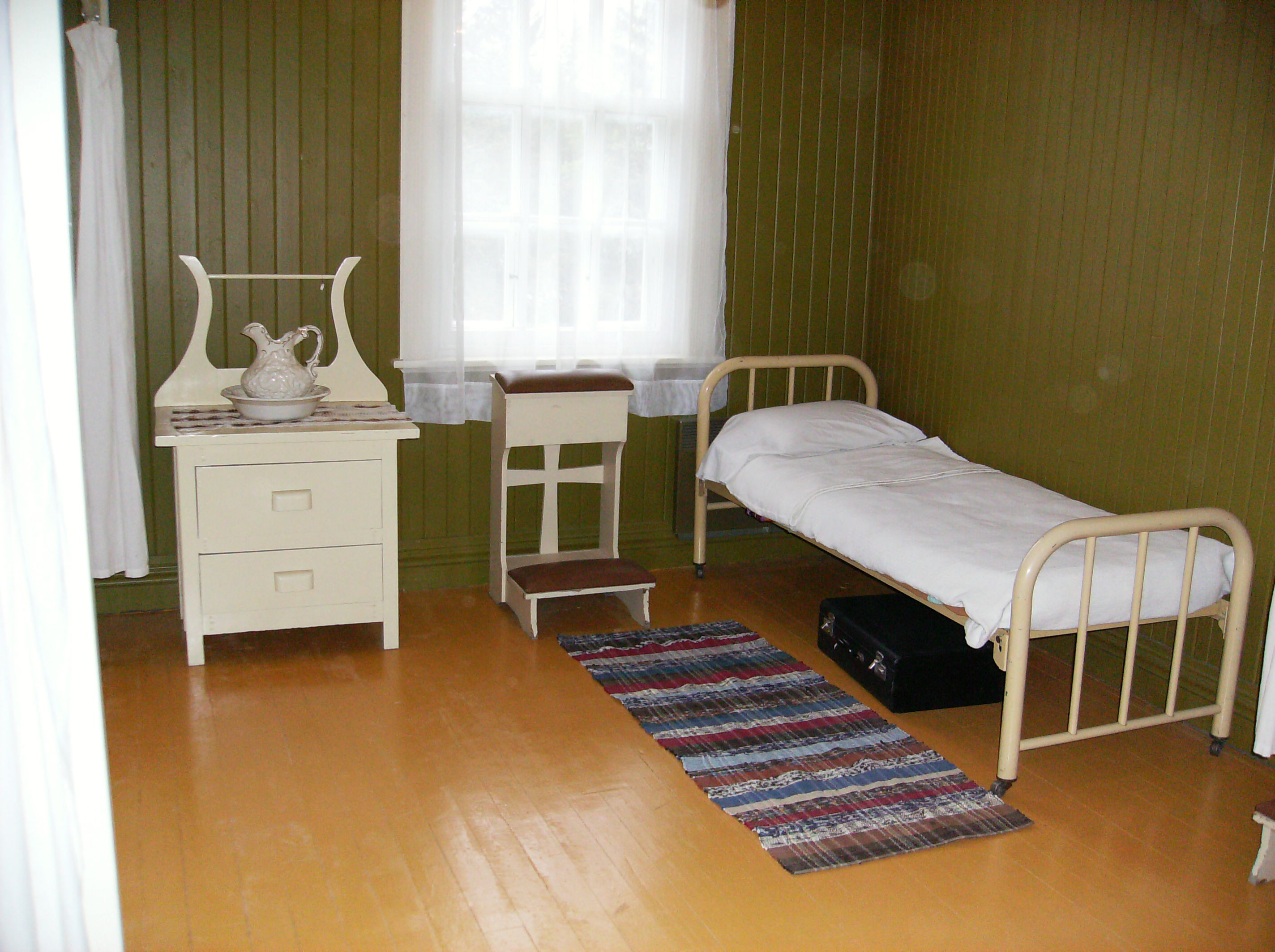 intérieur historique des maisons d'ouvriers Val Jalbert Québec Canada